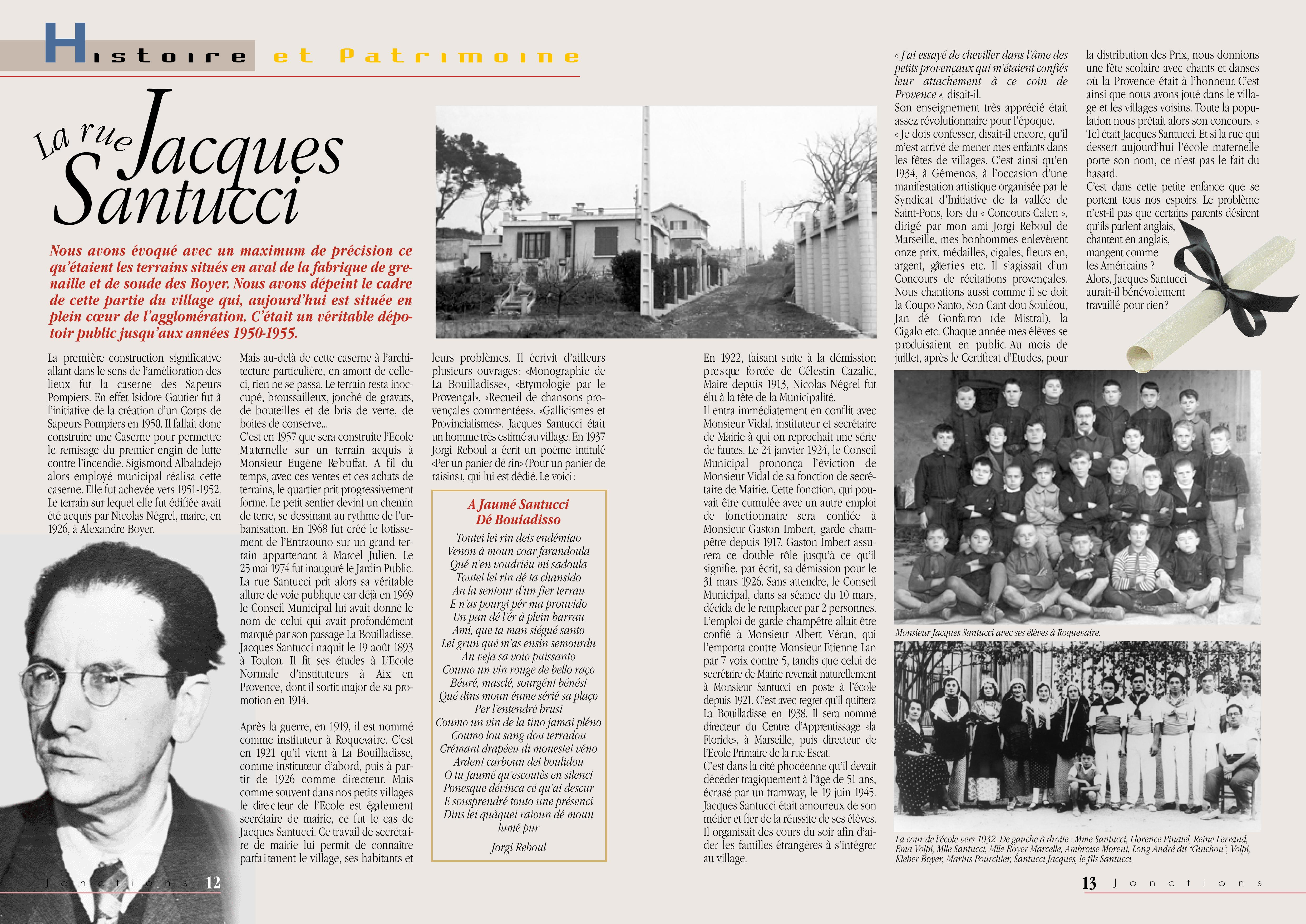 La médiathèque de la Bouilladisse citera Jorgi REBOUL dans la salle dédiée à la jeunesse.